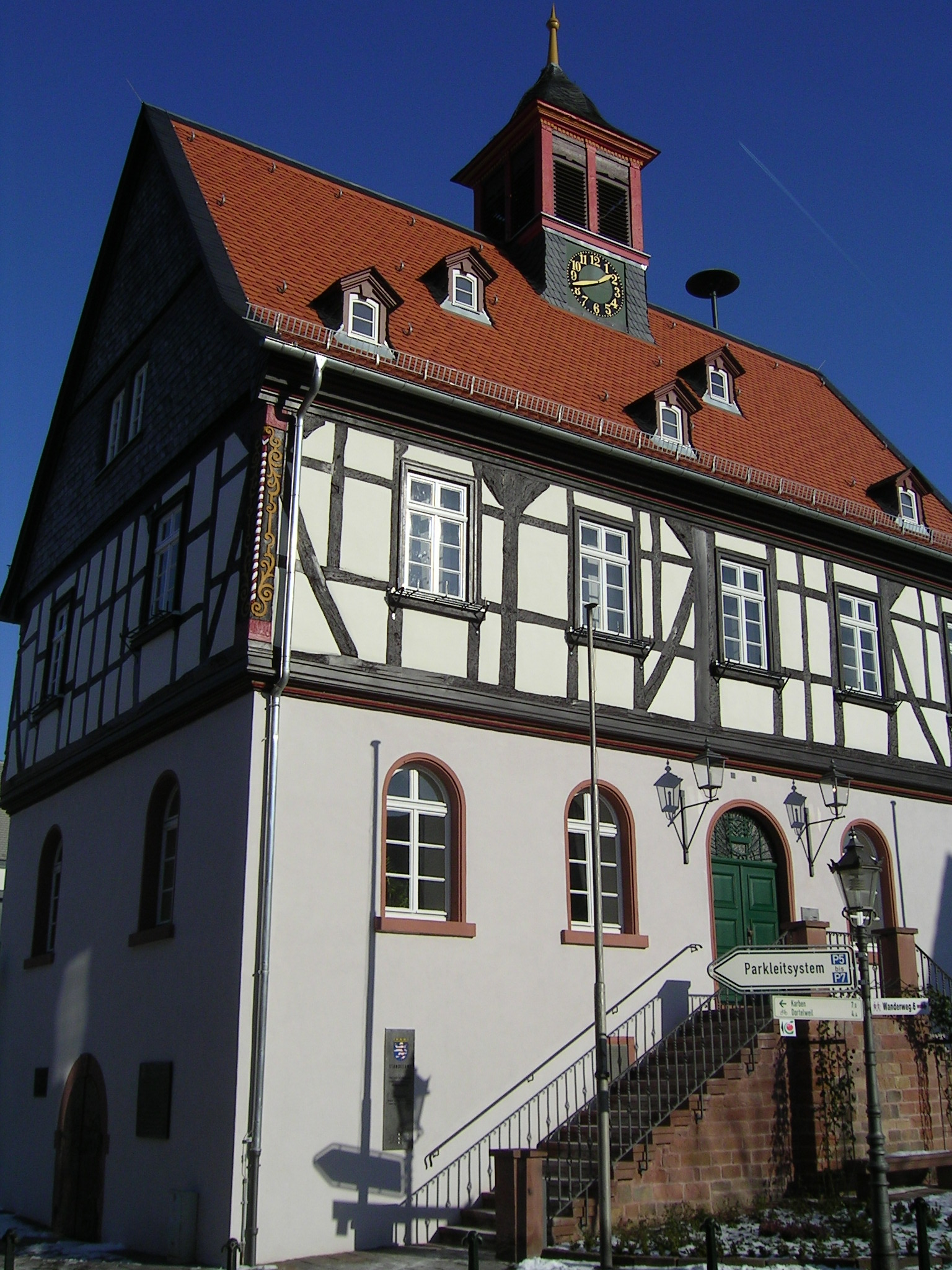 Altes Rathaus in Bad Vilbel selbst fotografiert Cmdr